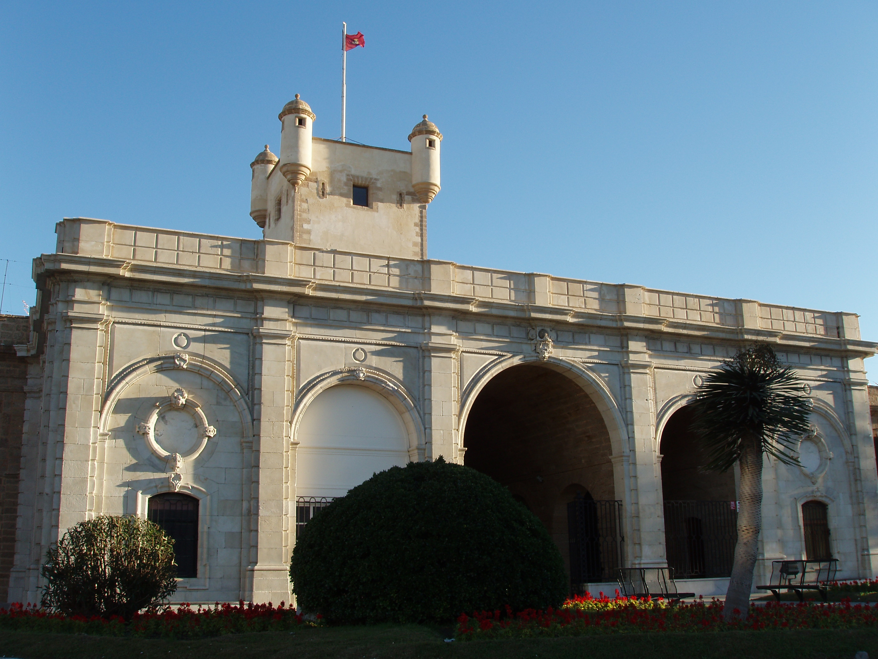 Puertas de Tierra, en Cádiz (España)